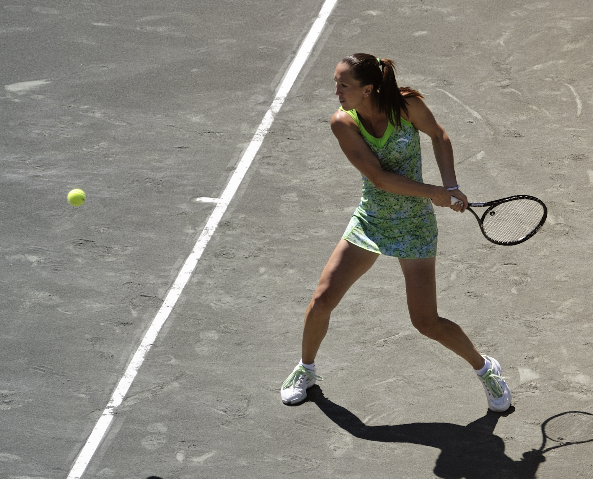 J Jankovic